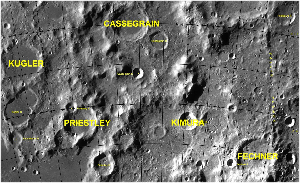 Cráter lunar Priestley. Localización. (Imagen LRO)